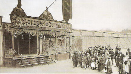 Menagerie Continental des Karl Krone (1833-1900, Vater des Zirkusgründers Carl Krone)